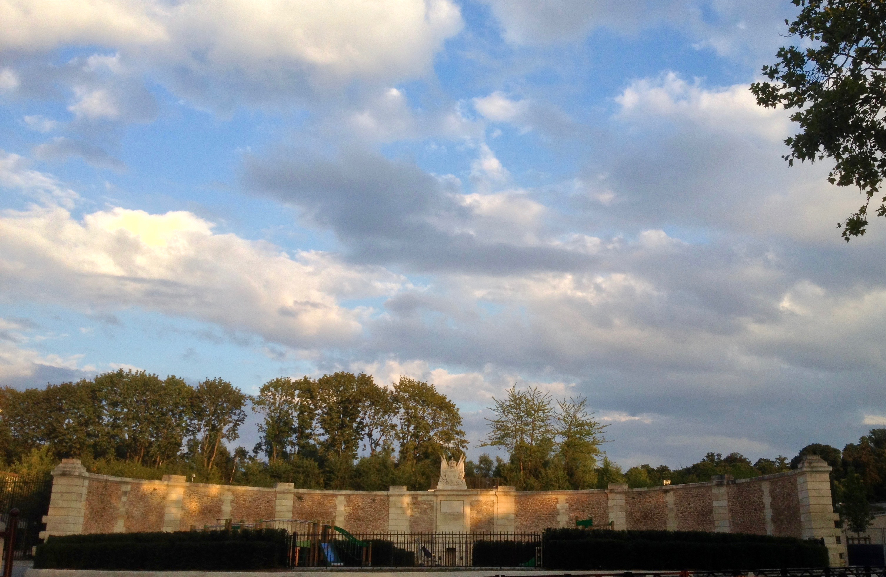 Un ancien abreuvoir à chevaux transformé en 2016 comme labyrinthe végétal et une aire de jeux pour les enfants